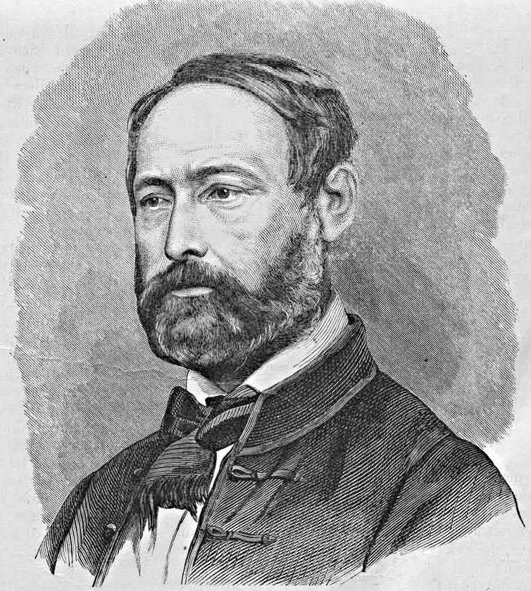 Tompa Mihály (1817–1868) (Vasárnapi Ujság, 1868. január 5.)